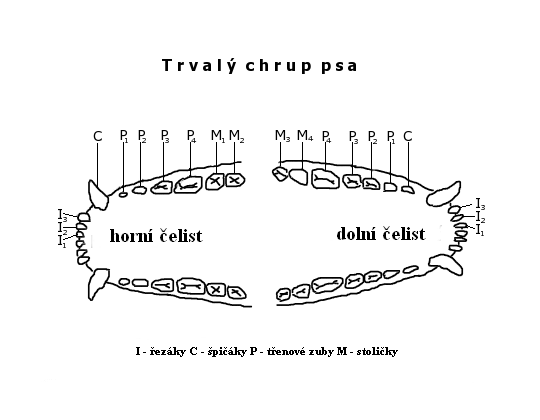 chrup psa s českými titulky